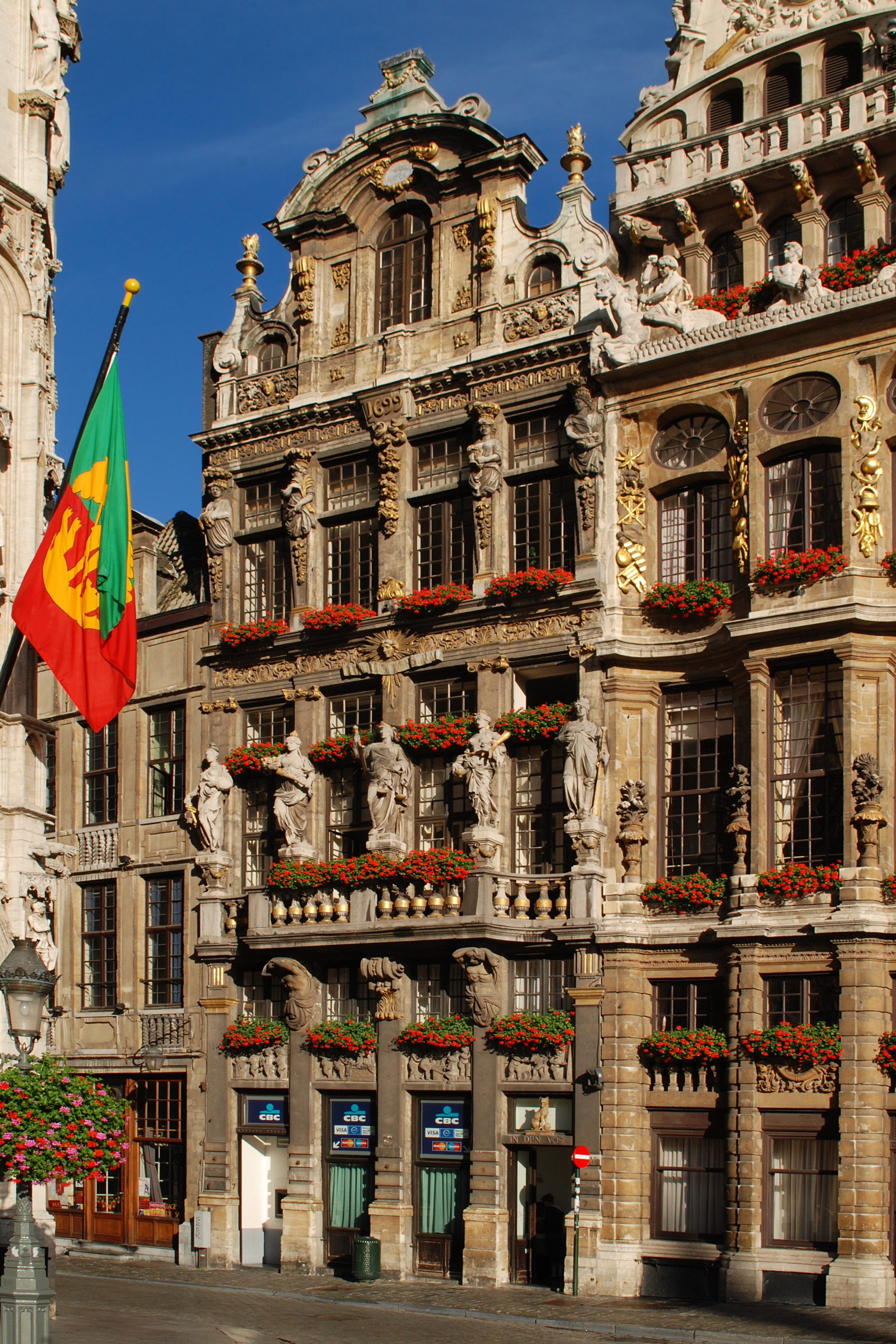 Belgique - Bruxelles - Grand-Place - Maison du Renard